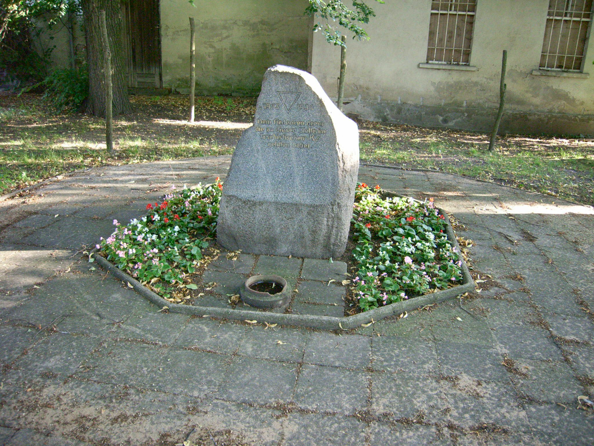 Roßlau,Gedenkstein, Inschrift: 1933 1934, Dem Gedenken derer die an dieser Stelle im faschistischen KZ gelitten haben